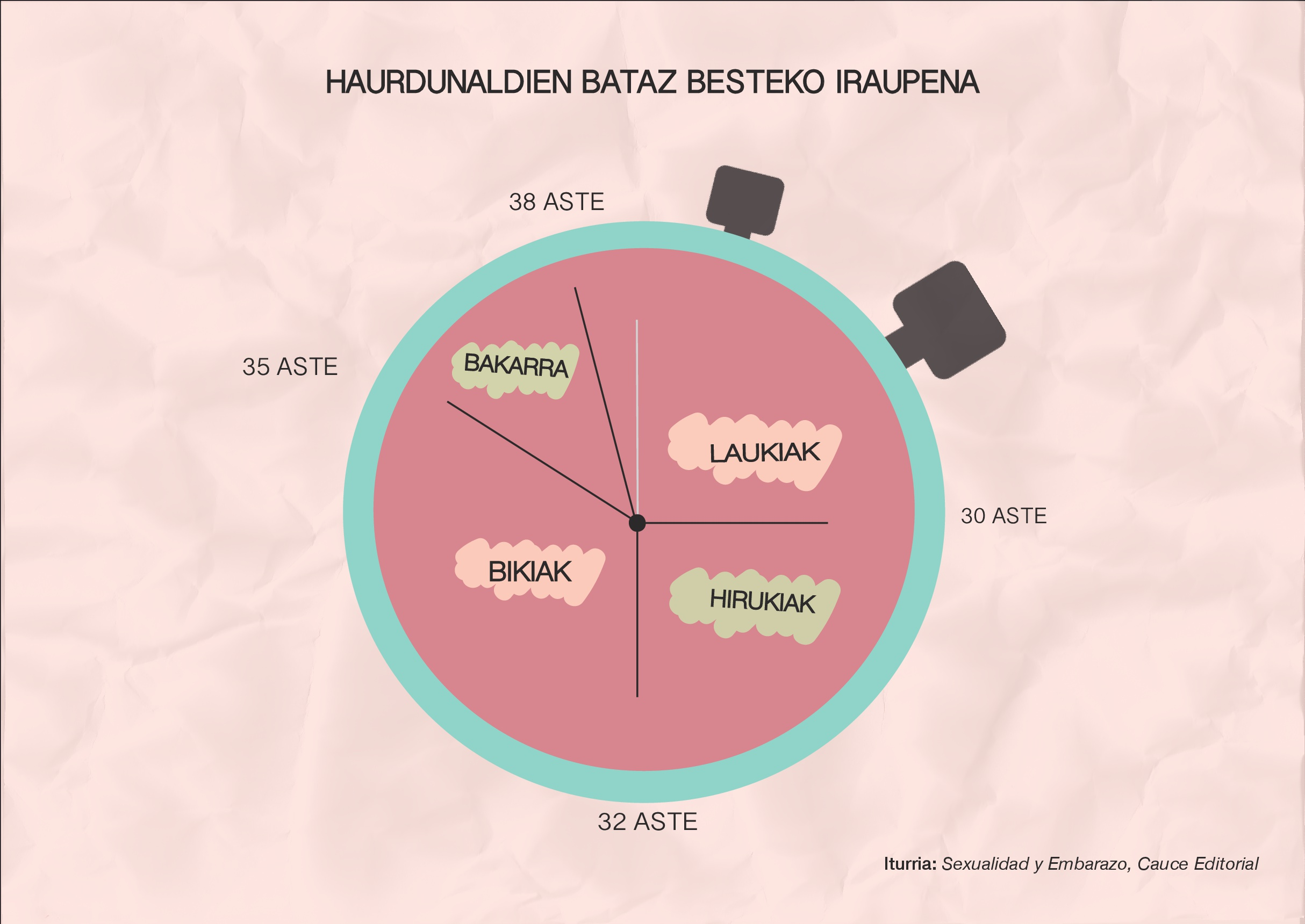 Ume bakarrak, bikiak, hirukiak edo laukiak diren arabera haurdunaldiak duen iraupena.